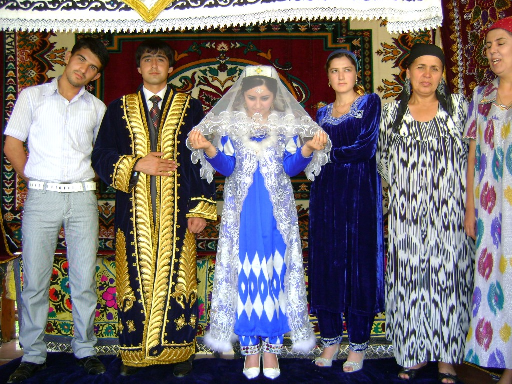 Свадебная церемония в Гиссарском районе Таджикистана Тоҷикӣ: Маросими тӯйи никоҳ дар ноҳияи Ҳисори Тоҷикистон